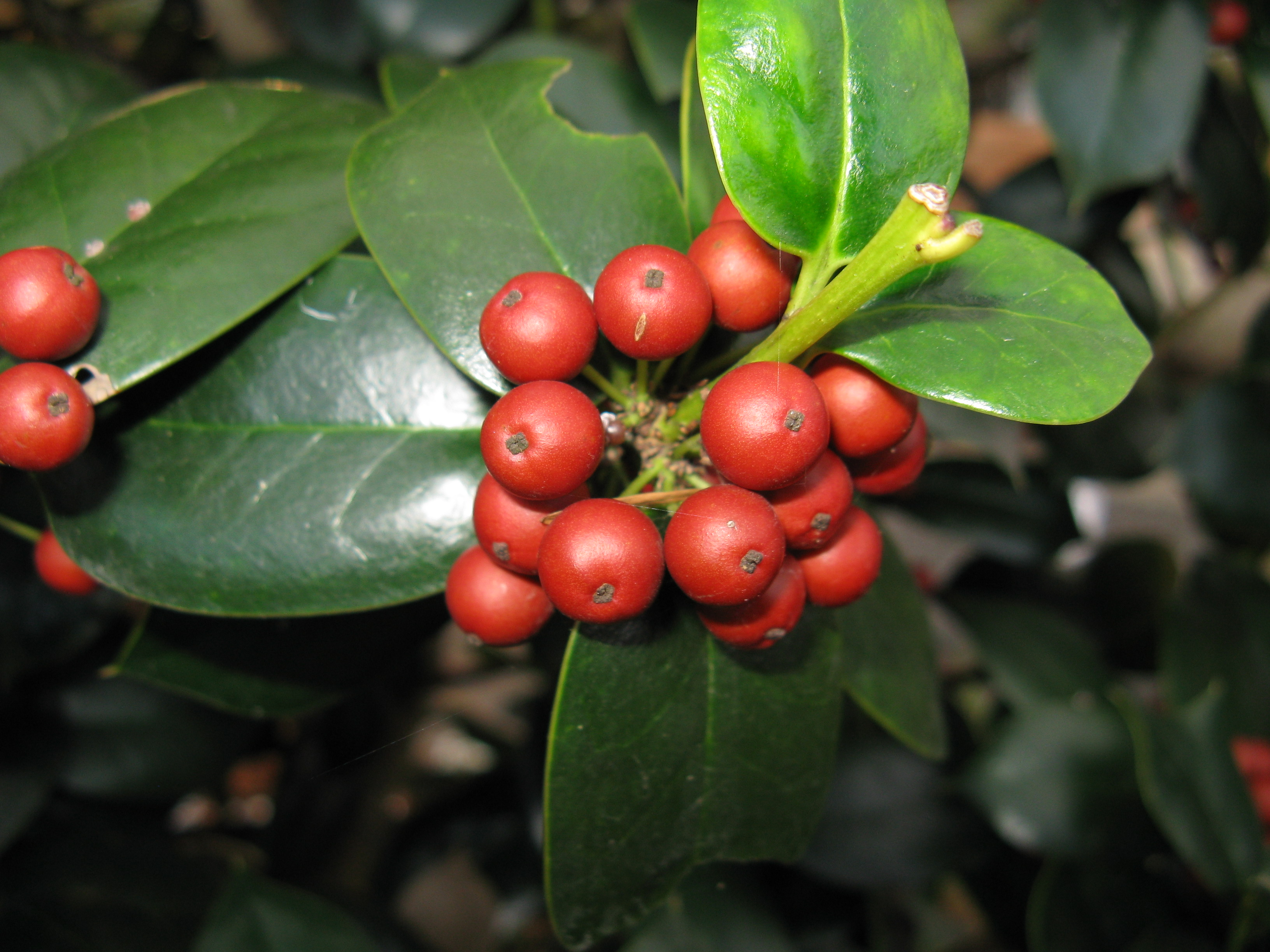 Ilex cornuta